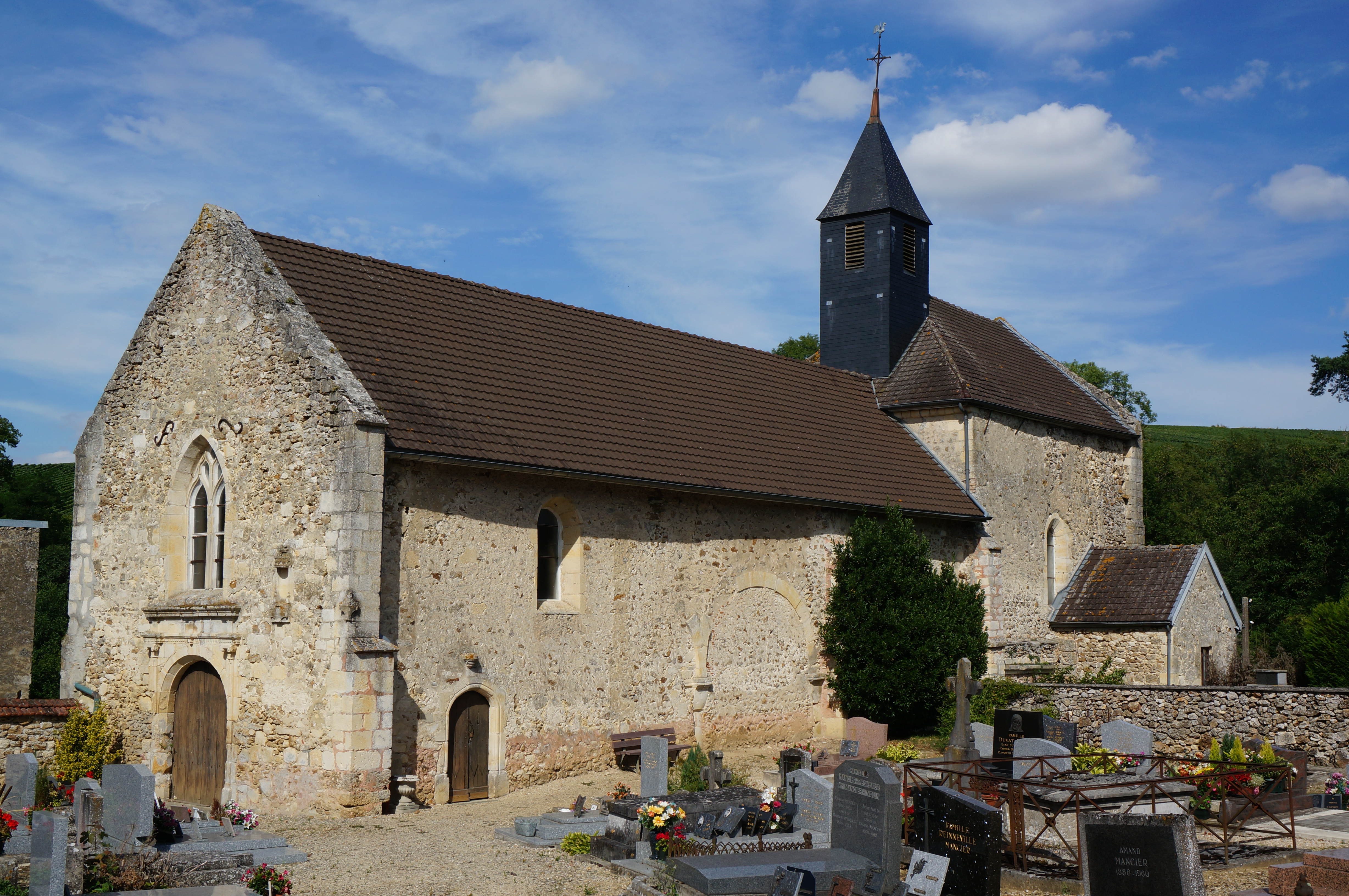 Vue de .